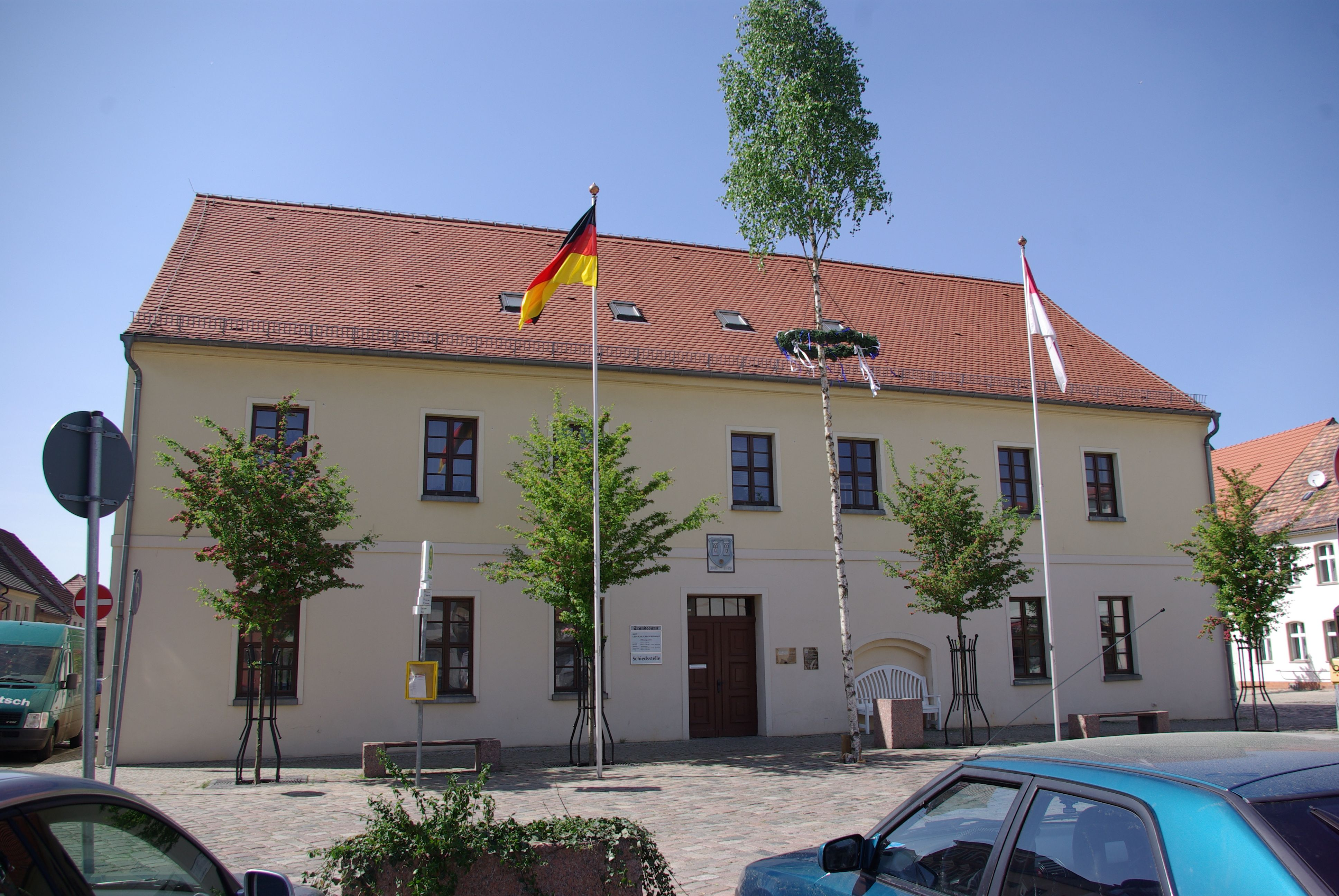 Lieberose in Brandenburg. Das Rathaus am Markt steht unter Denkmalschutz. Hinter dem Rathaus befindet sich die Stadtkirche.